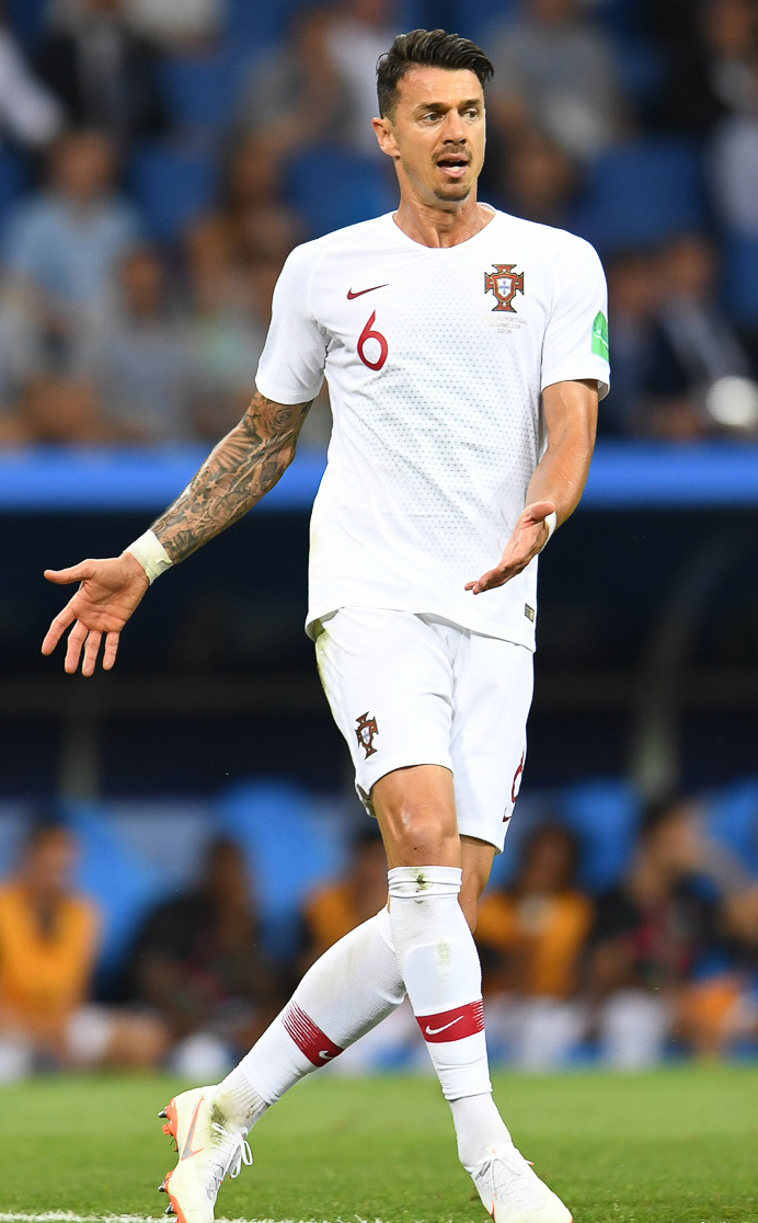 День, когда Роналду попрощался с ЧМ. Кавани и Суарес идут дальше